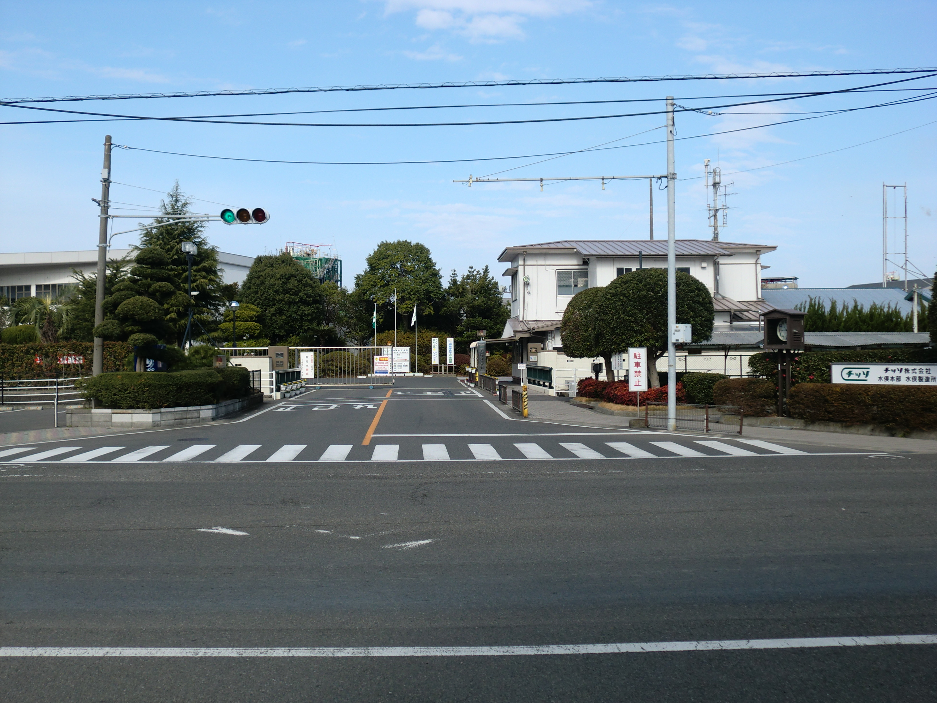 JNC（旧チッソ）水俣工場正門。チッソ水俣工場時代